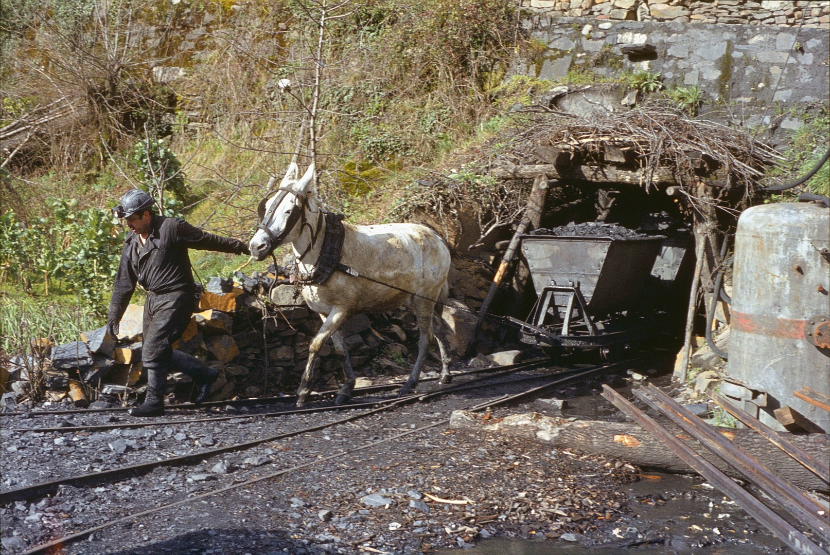 Une petite exploitation minière vers Matarrosa del Sil en 1984.